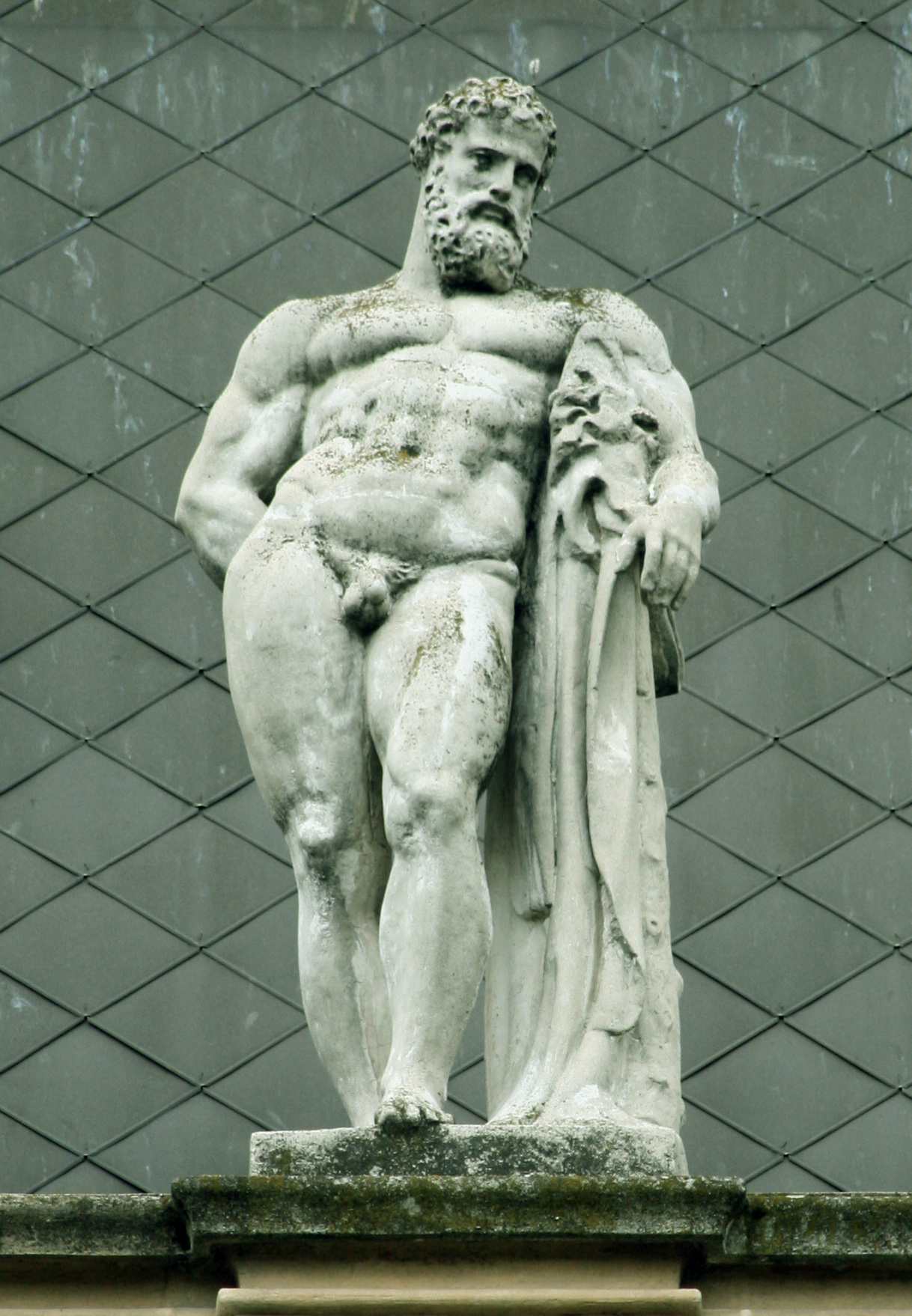 Skulptúra "Herkulesa"na budove Vysokej škole výtvarných umení v Bratislave. Koža leva je symbolom sily, víťazstva a odvahy.